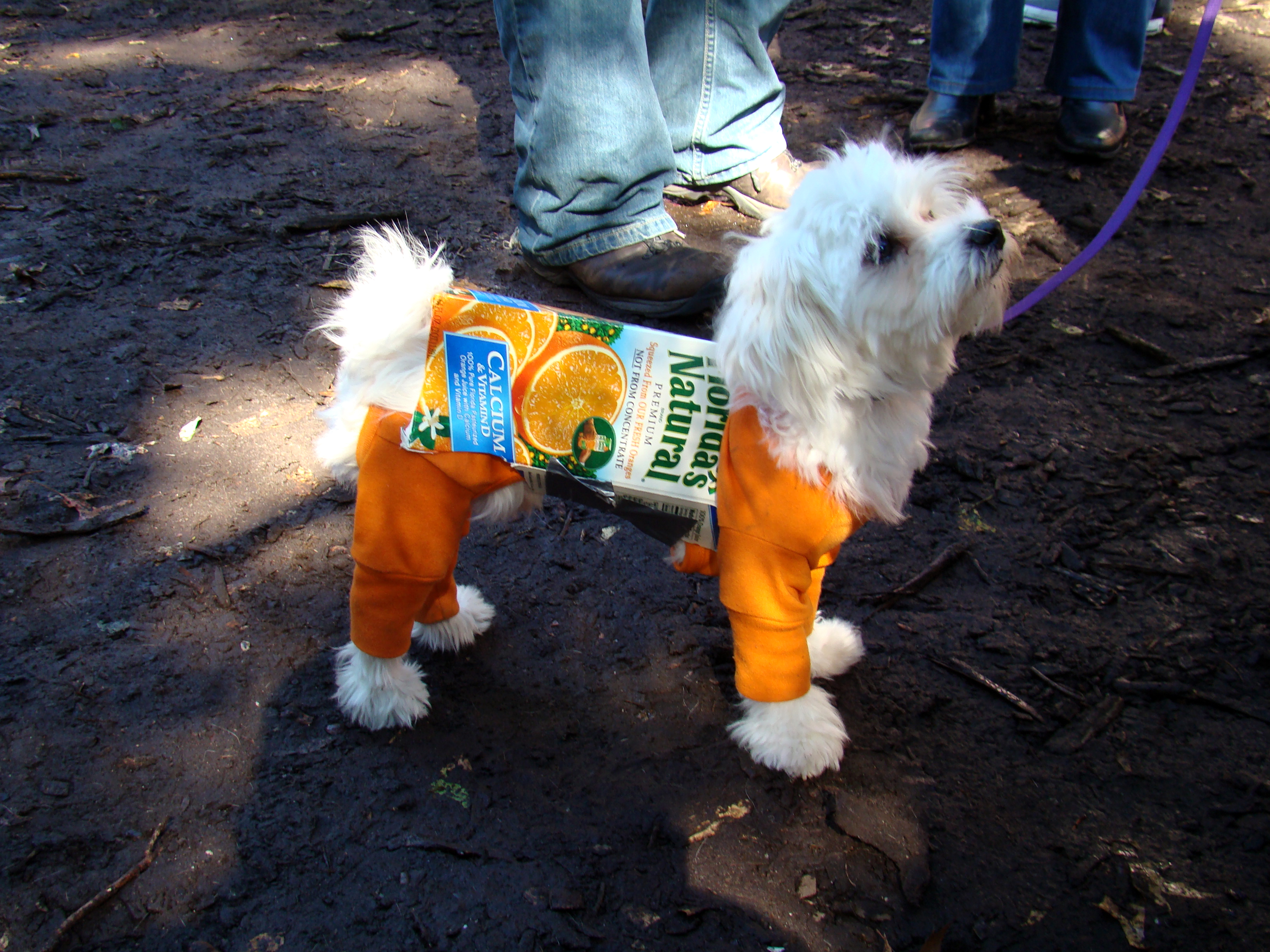 natural